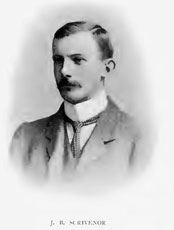 J.B.Scrivenor